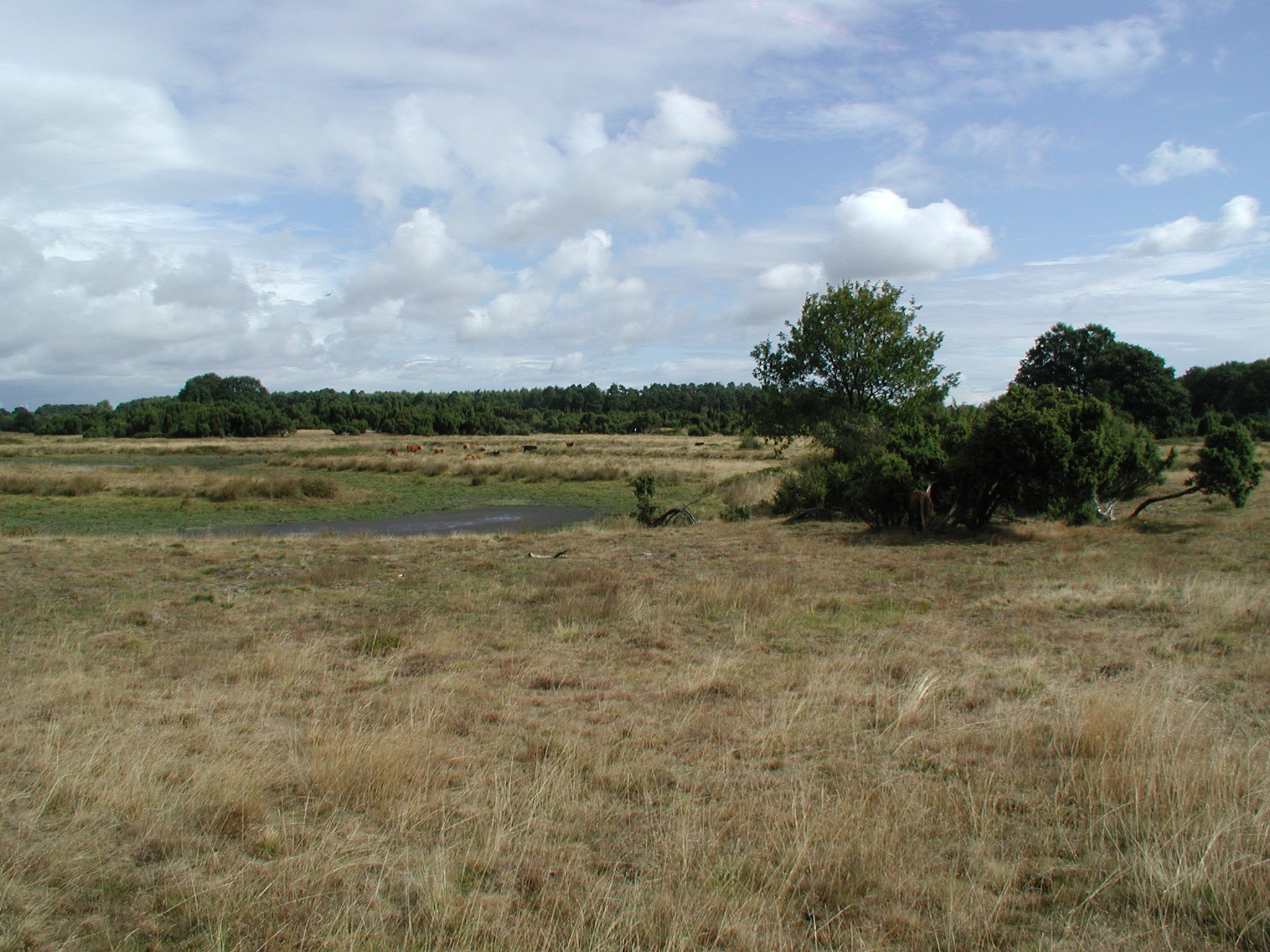 Haselünner Wacholderhain, Emsland